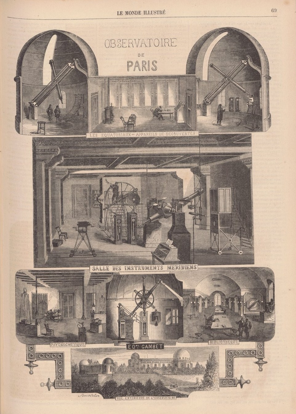 Illustrations de l'Observatoire de Paris.